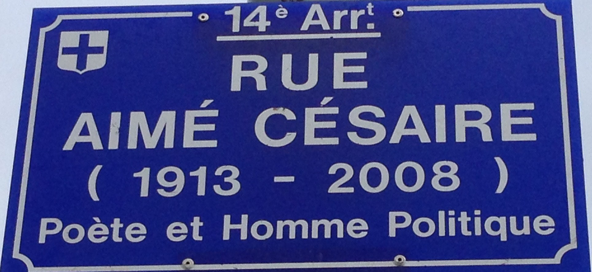 Plaque rue Aimé Césaire